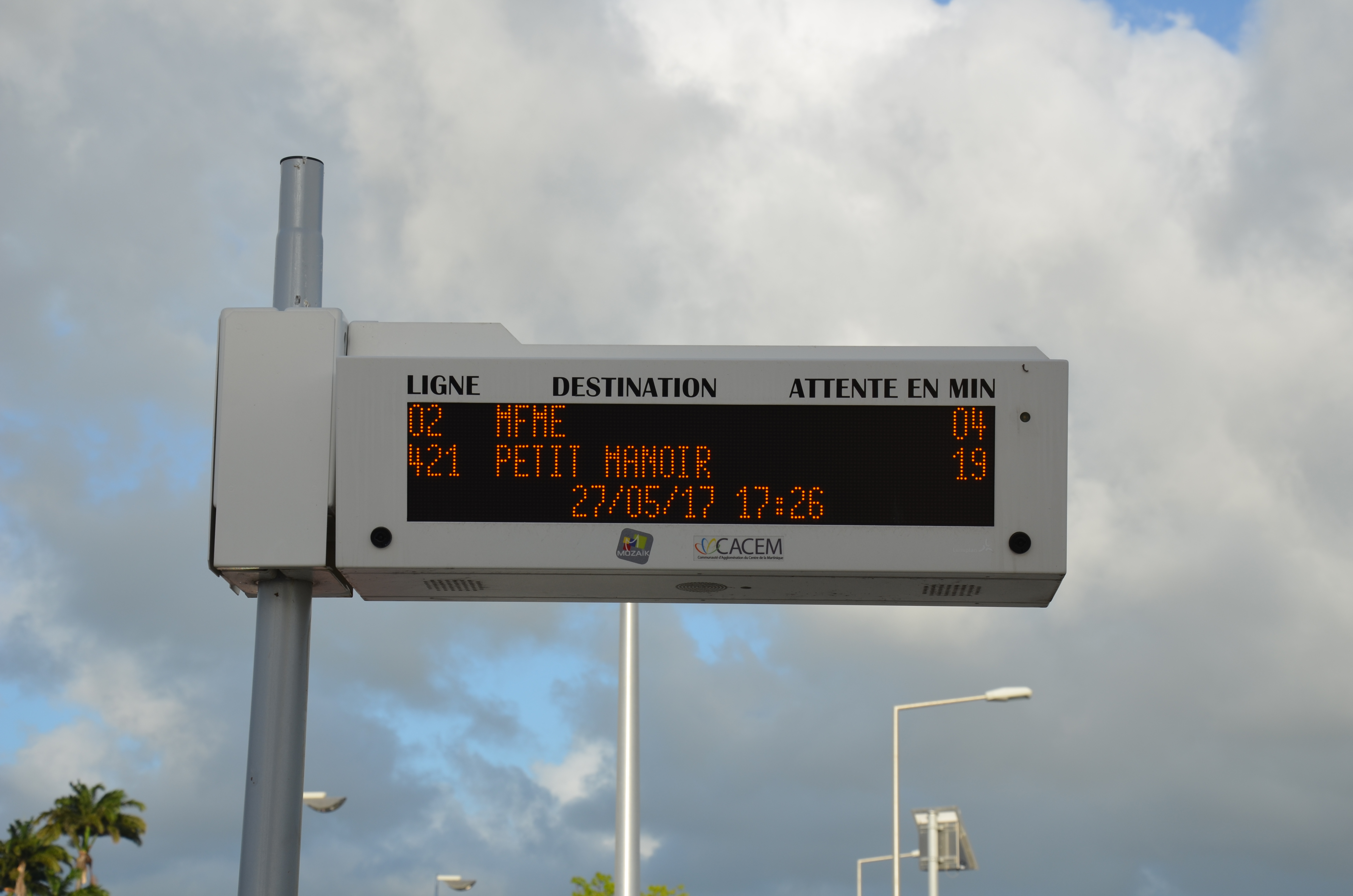 Borne d'Information Voyageurs du TCSP en Martinique, en tests. Photo prise à la station "Aéroport".